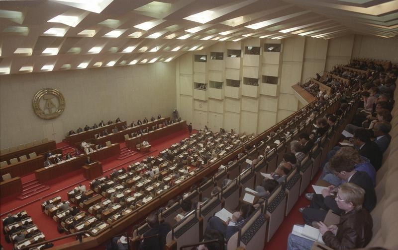 ADN-ZB / Schindler / 19.4.90/ Berlin: Während der 3. Sitzung der Volkskammer der DDR gab Ministerpräsident Lothar de Maiziere vor den Parlamentsabgeordneten seine Regierungserklärung ab. Die Erklärung steht unter dem Motto: "Politik für unser Volk: demokratisch - entschlossen - umsichtig".